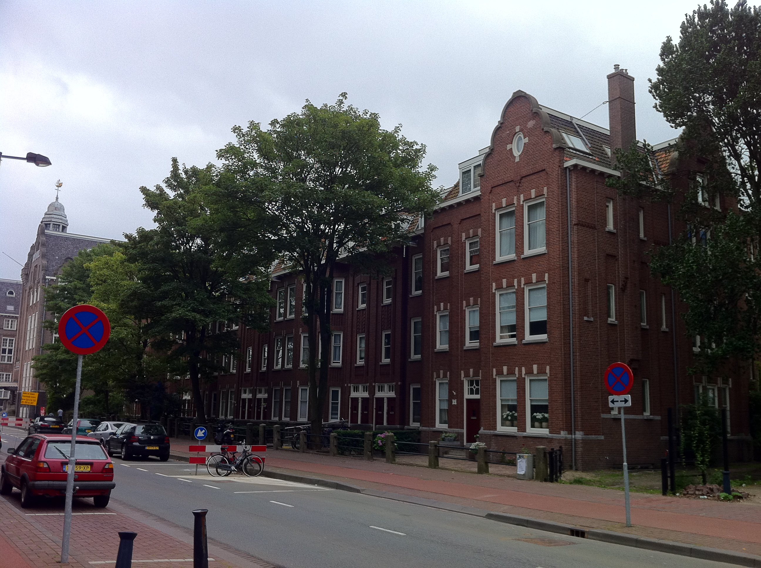 Arbeiderswoningen Lloyd Complex Oostelijke Handelsblad Amsterdam